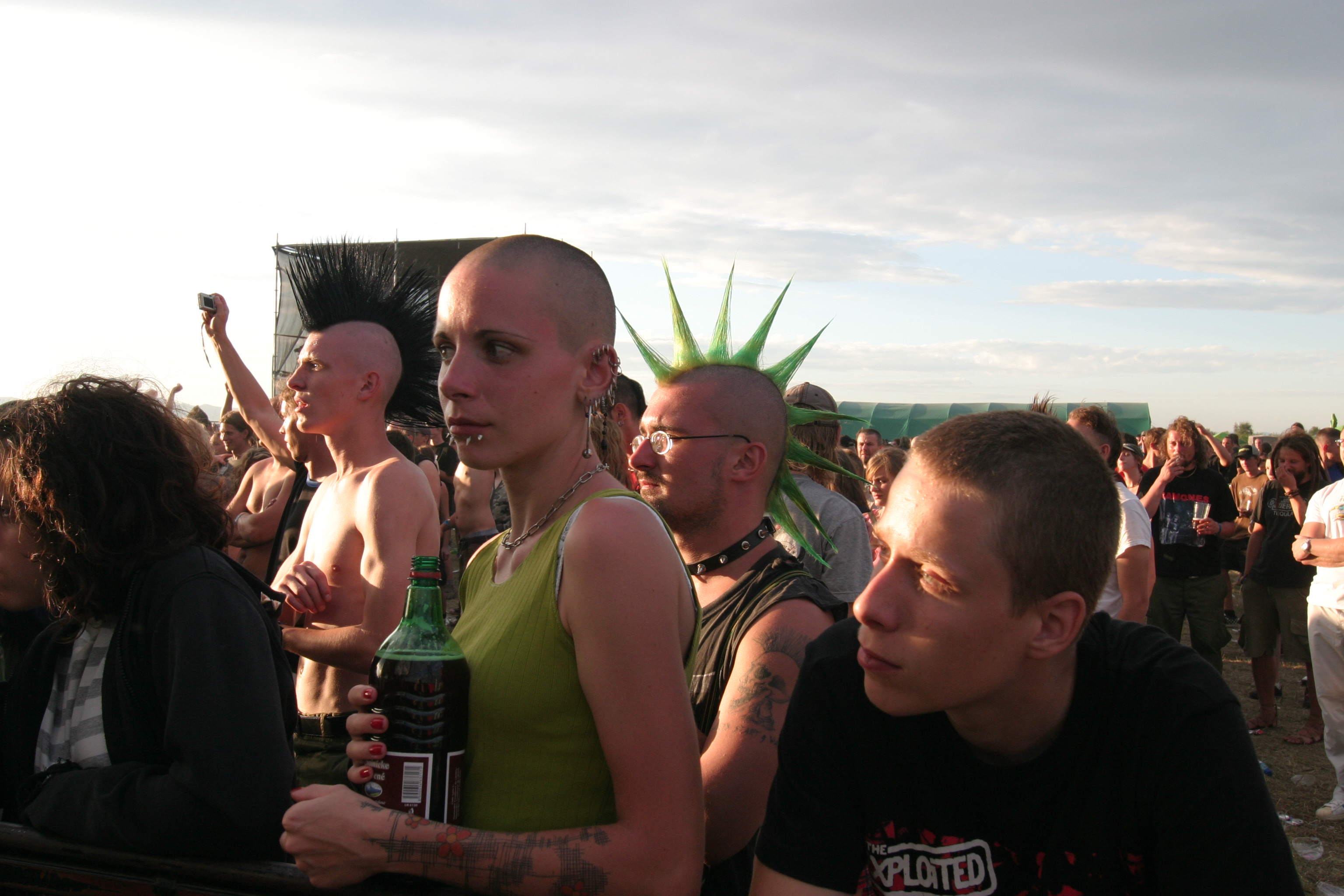 Festival Hodokvas - Piešťany 2006